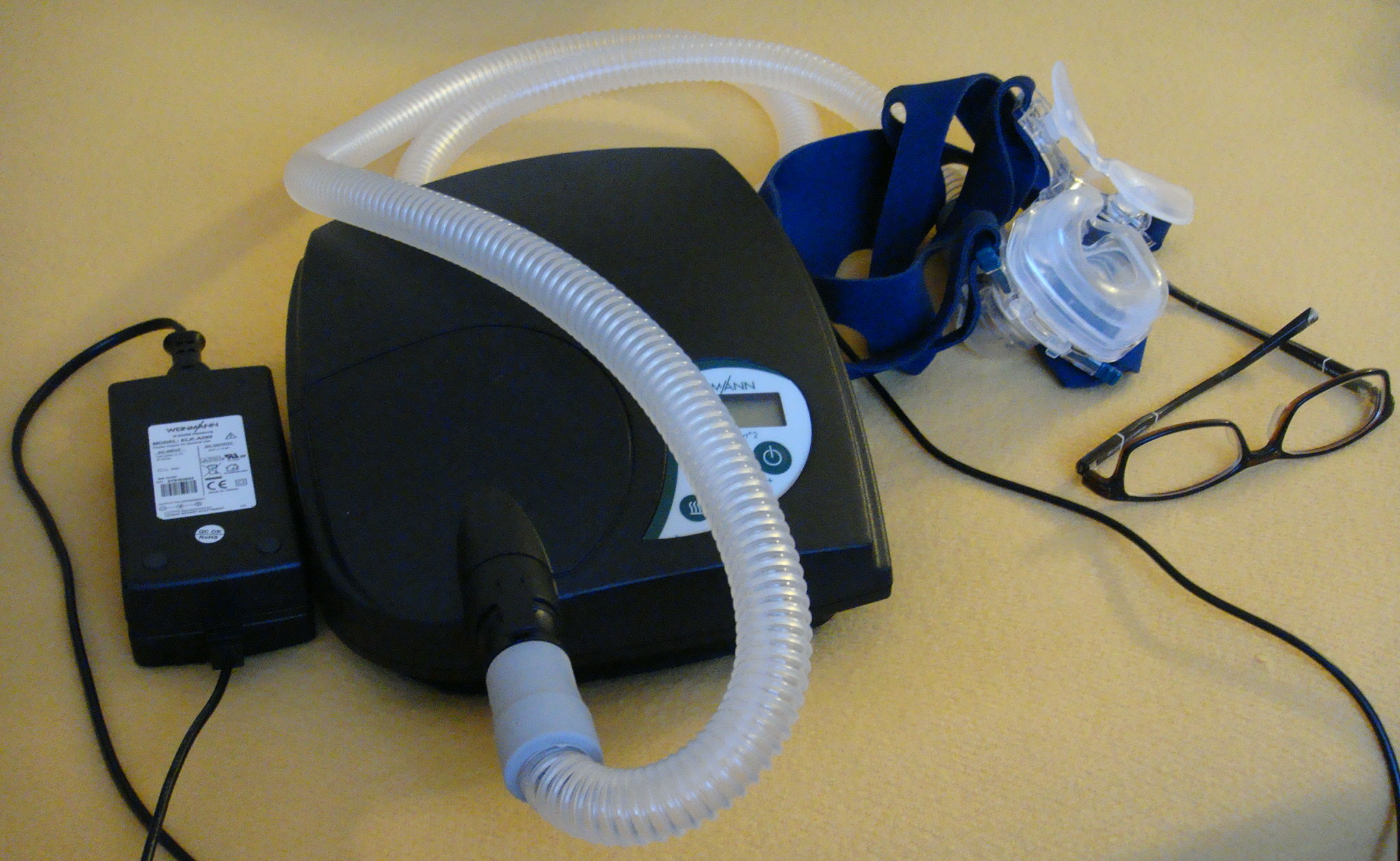 Equipment for CPAP therapy at home and when travelling. (The pair of spectacles has been added as size reference.)